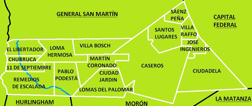 División de localidades del Partido Tres de Febrero.